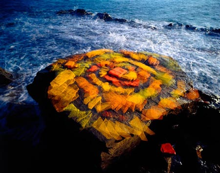 Jan Pohribný, fotografické dílo